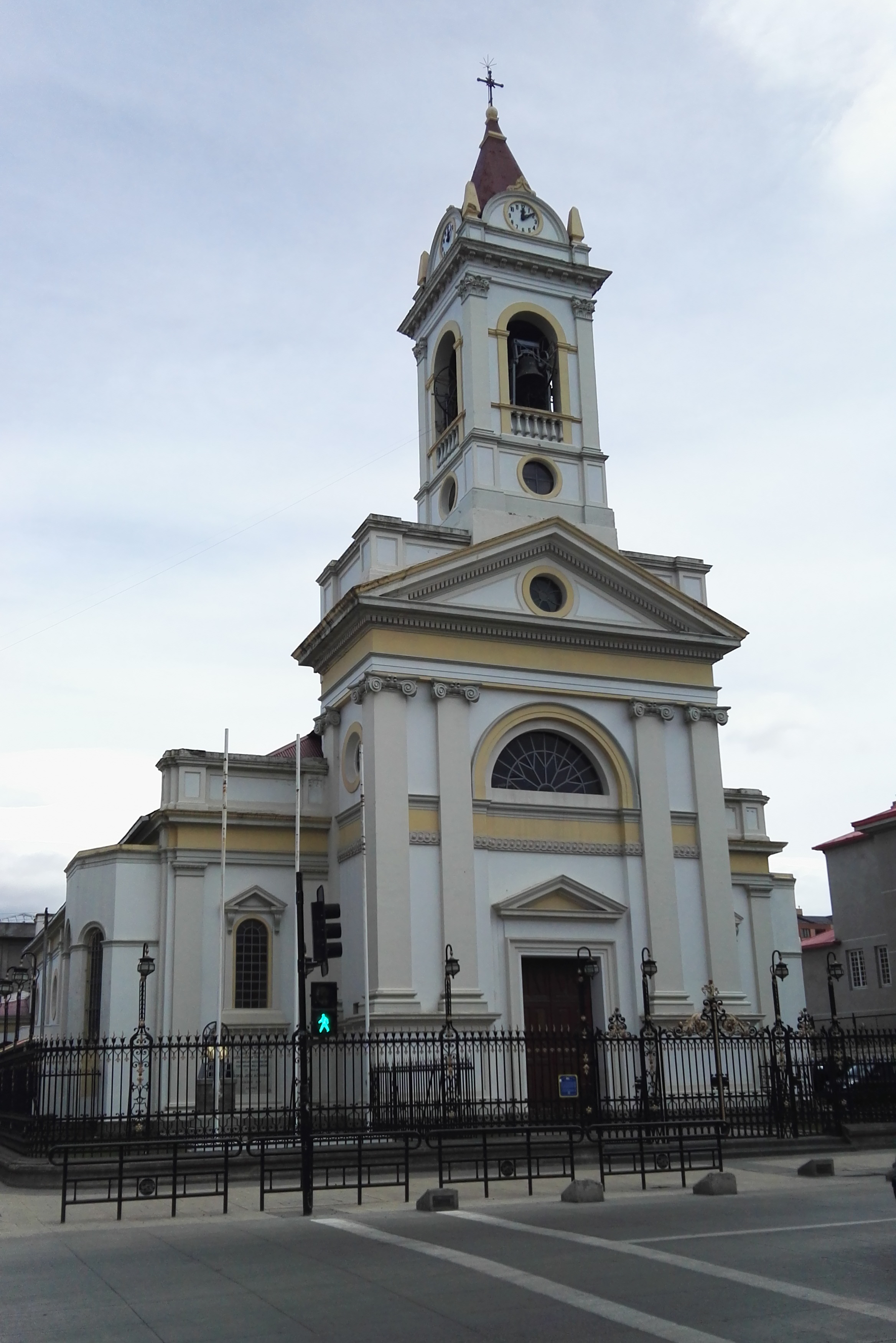 Kathedrale von Punta Arenas am Plaza Muñoz Gamero